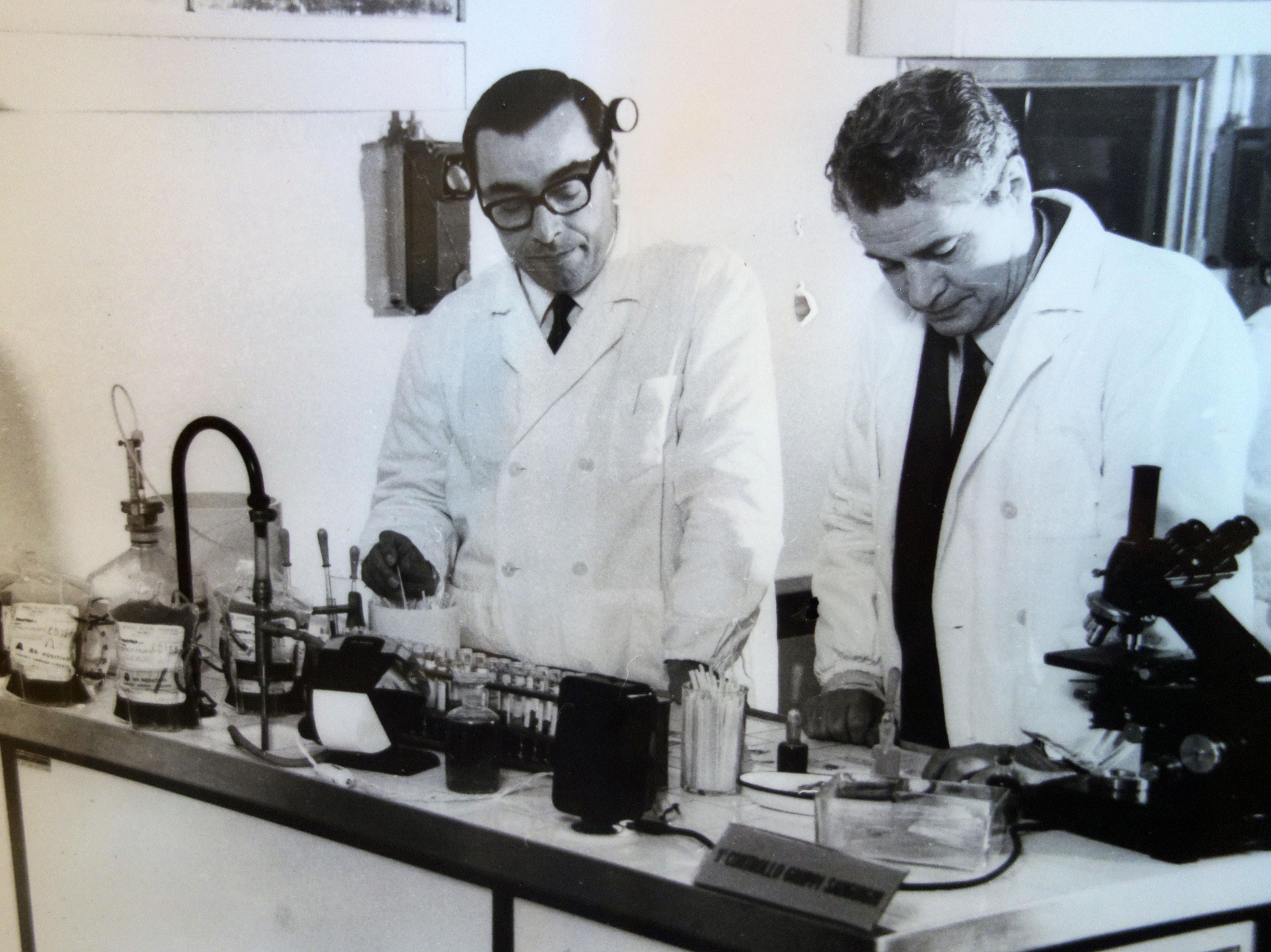 Prof Donati in laboratorio